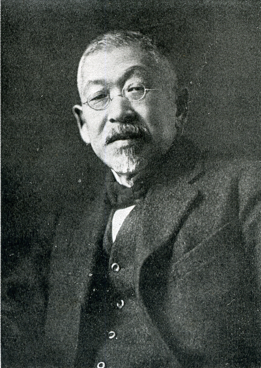 この写真は、中橋徳五郎（1861-1934）の写真です。